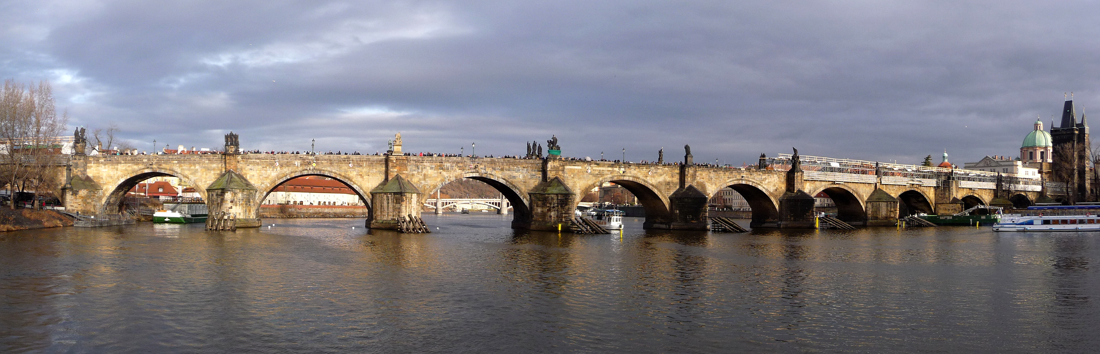 Karlsbrücke in Prag, aufgenommen von einem Ausflugsboot auf der Moldau, Panorama erzeugt mit Hugin